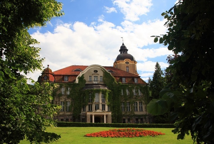 Łężany – wieś w woj. warmińsko-mazurskim, w powiecie kętrzyńskim, w gminie Reszel. Pałac